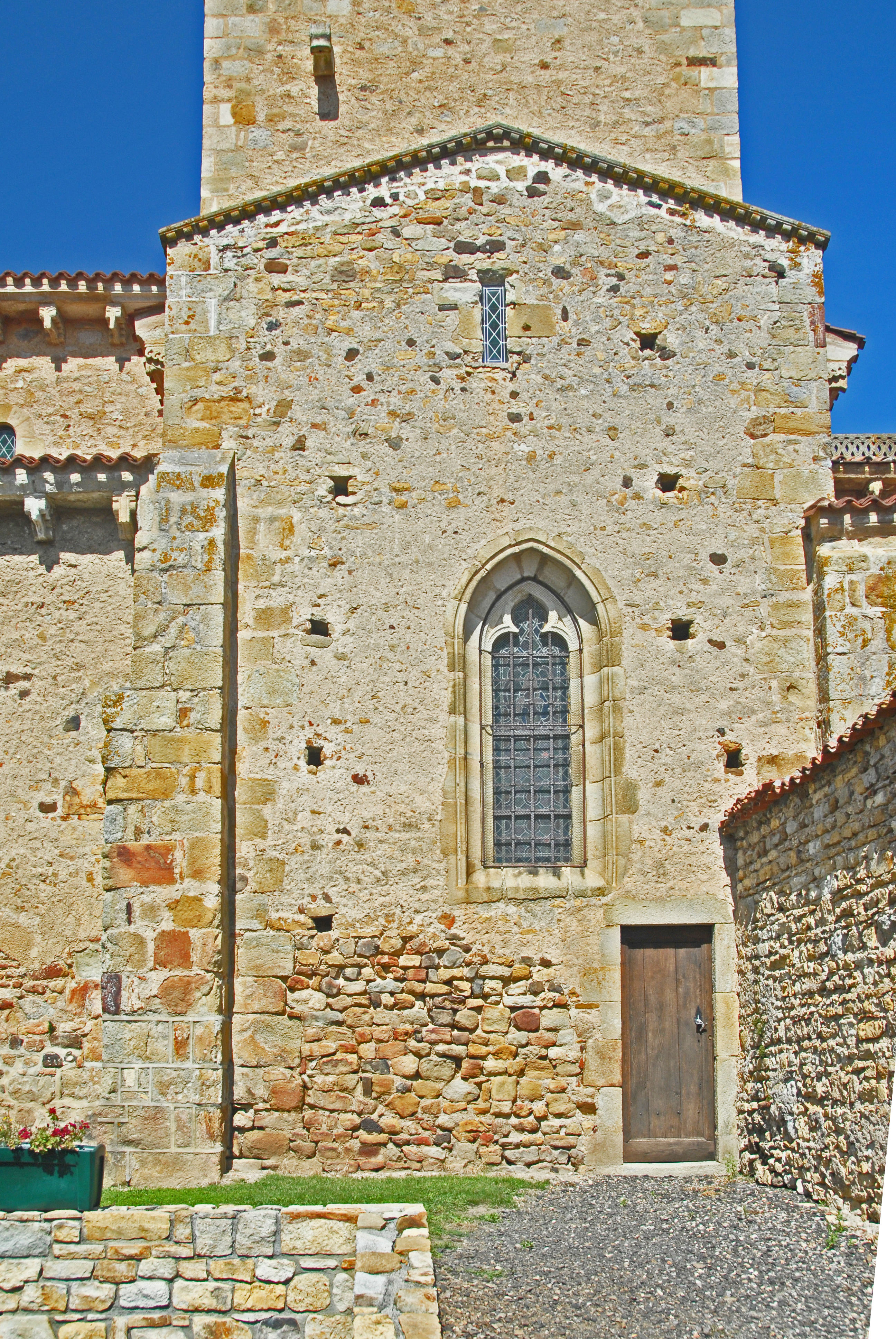 St.-Jean Glaine-Montaigut, südl. Querhausarm